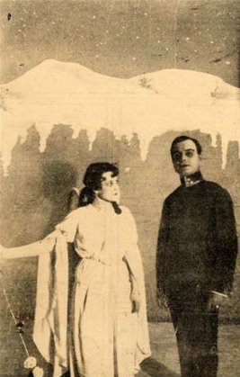 Molnár Ferenc: A fehér felhő; Társulat: Nemzeti Színház, Budapest; Bemutató: 1916-02-25; Rendező: Hevesi Sándor; Szereplők: Angyal: Bajor Gizi; Hadapród: Rajnai Gábor; Felvétel ideje: 1916